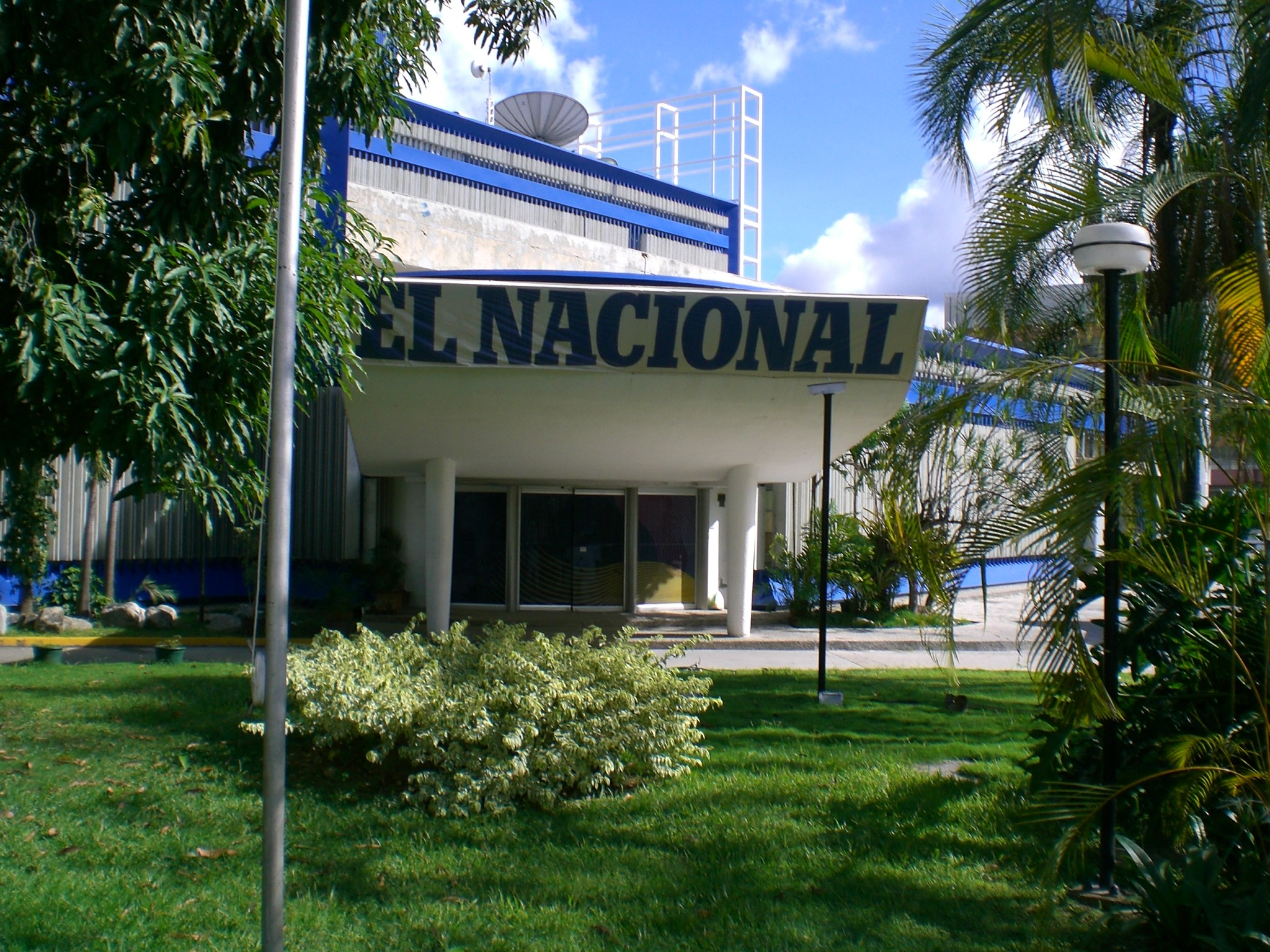 El Nacional building, Caracas, Venezuela